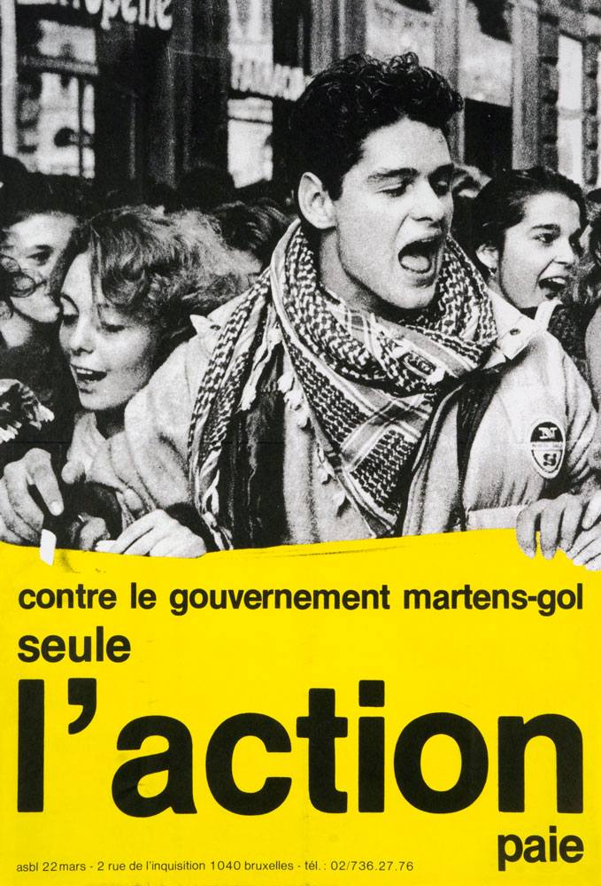 Affiche du journal Alternative Libertaire (Belgique) n°82 septembre 1986.